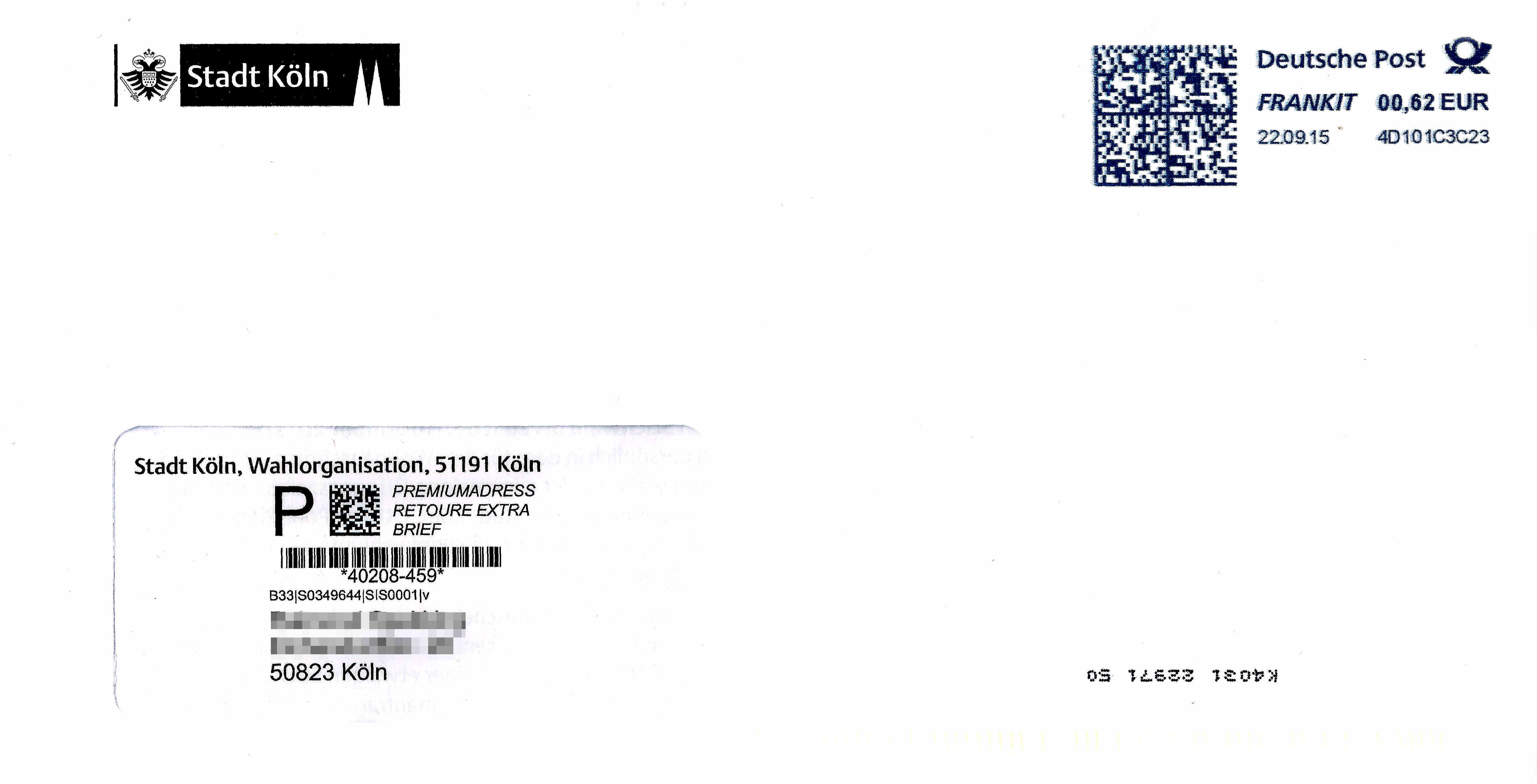 Fensterbriefumschlag, DV-Freimachung, Vorausverfügung: Premiumadress Retoure Extra Brief